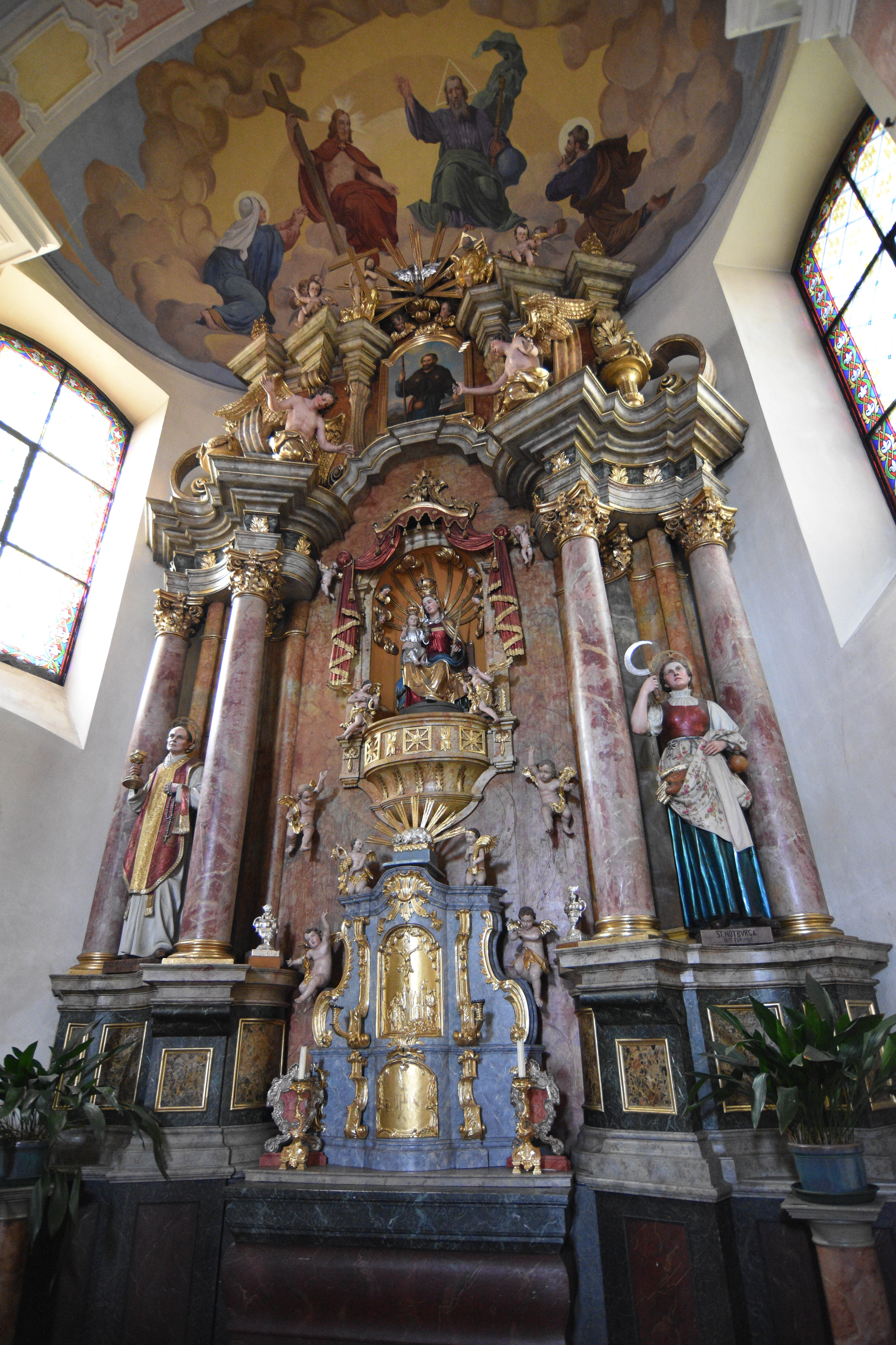 Hochaltar Pfarrkirche Nestelbach Interior